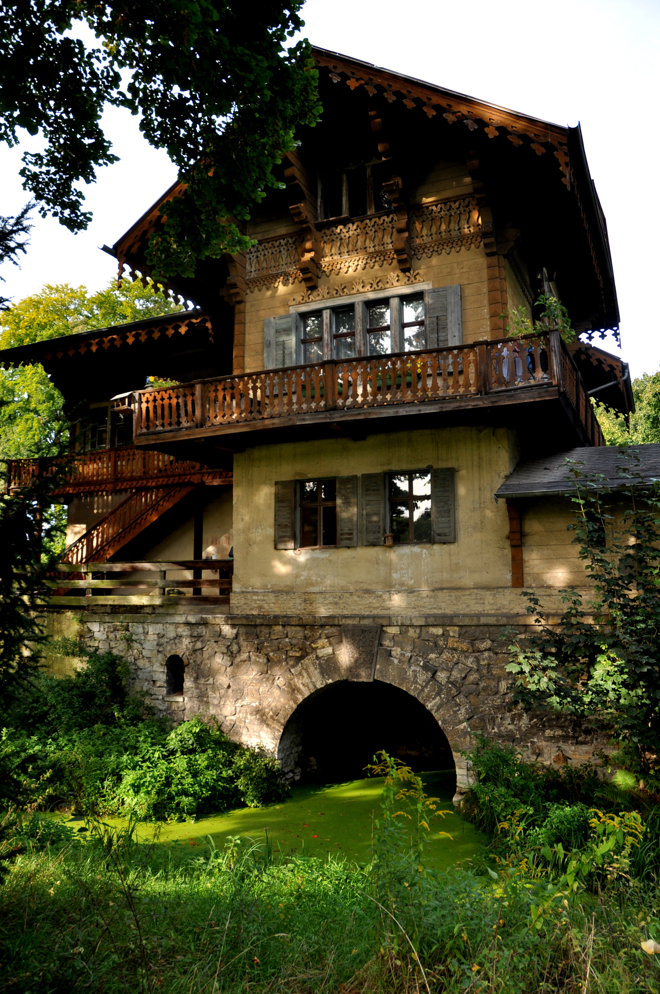 Schweizerhaus mit Galerien